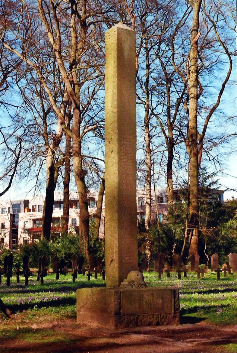 Gedenkstein für die im Ersten Weltkrieg Gefallenen des Städtischen Bauamts.